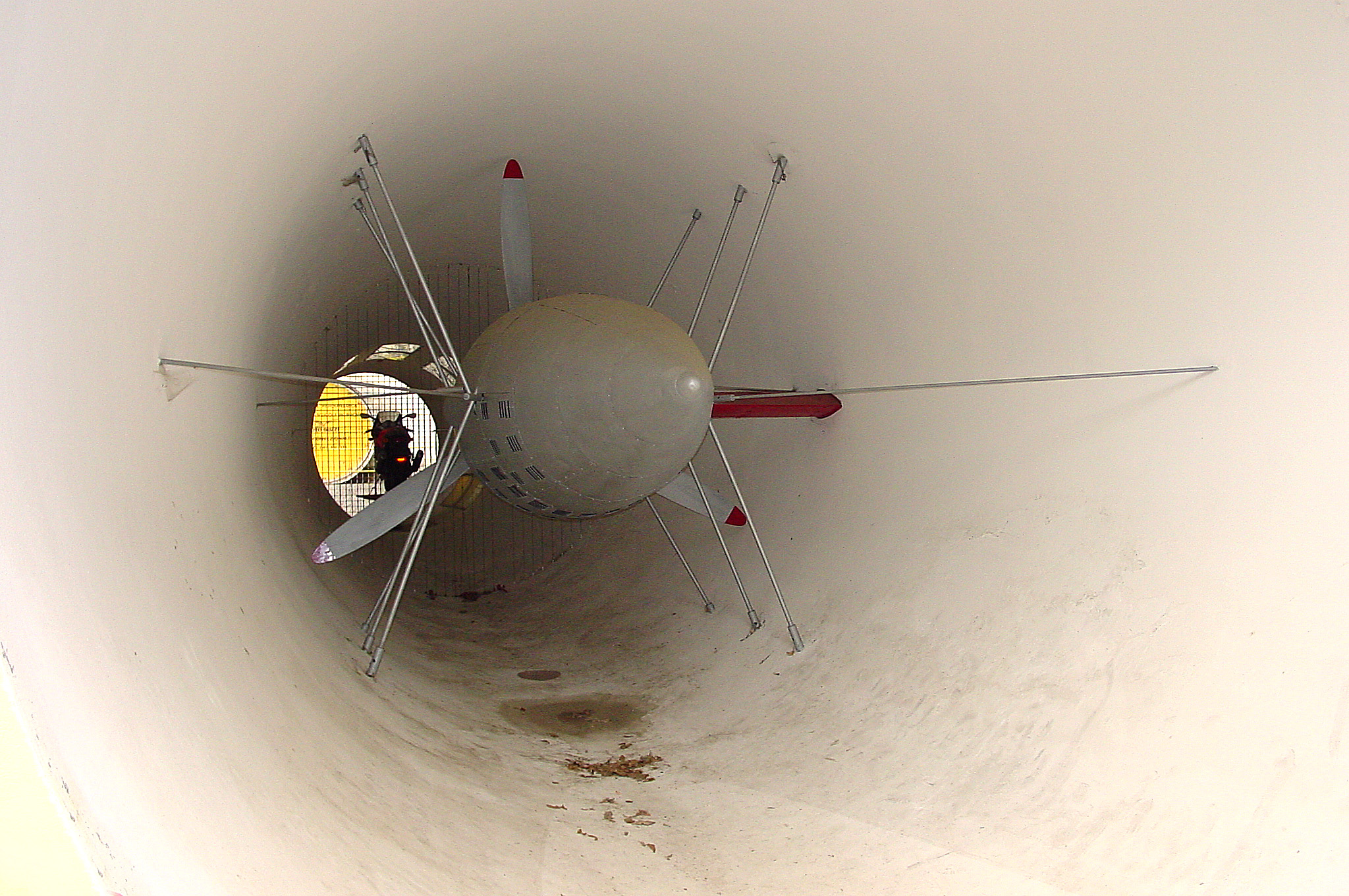 Soufflerie de Mandello